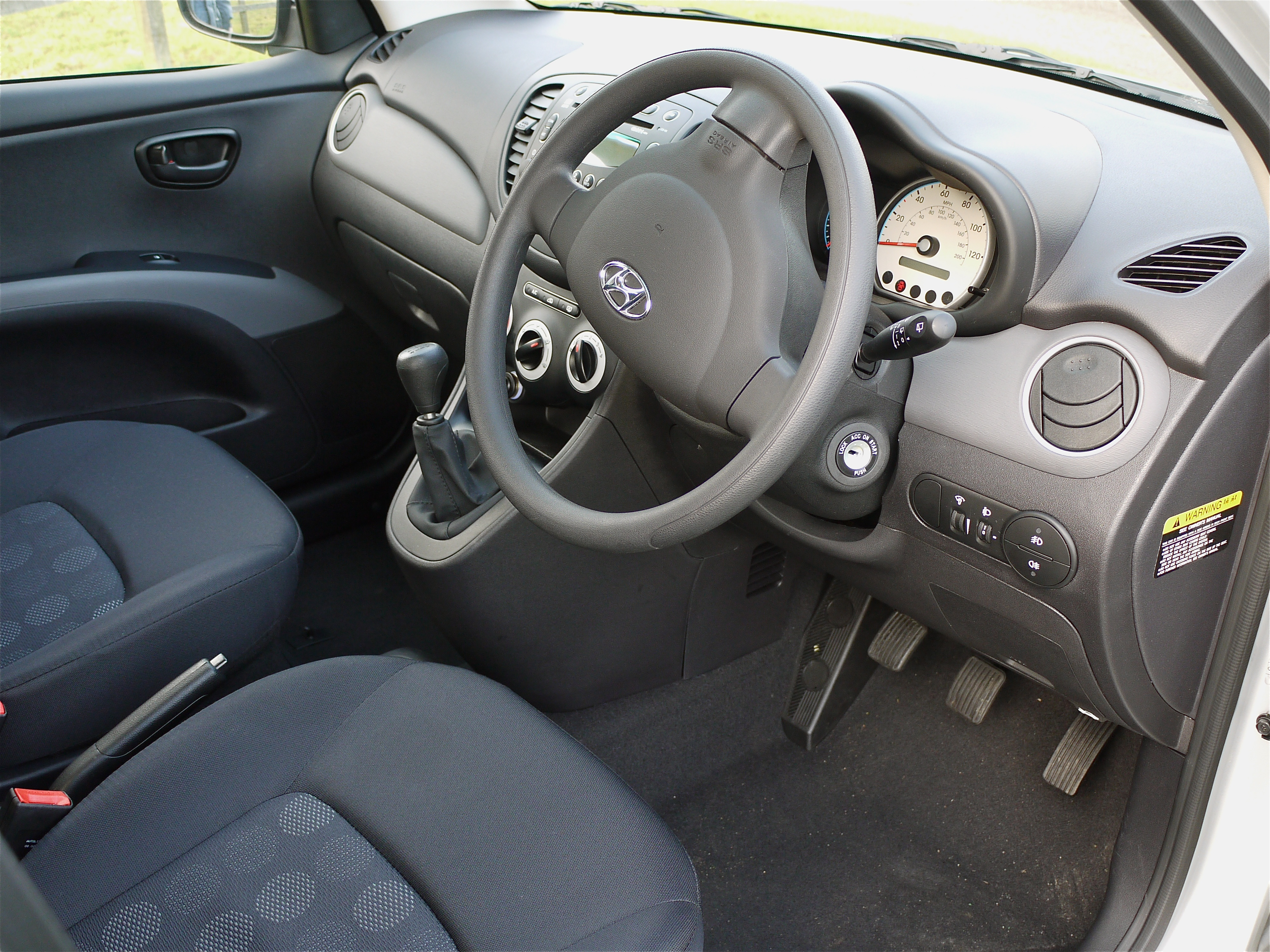 Panasonic G1 14-45 Lens